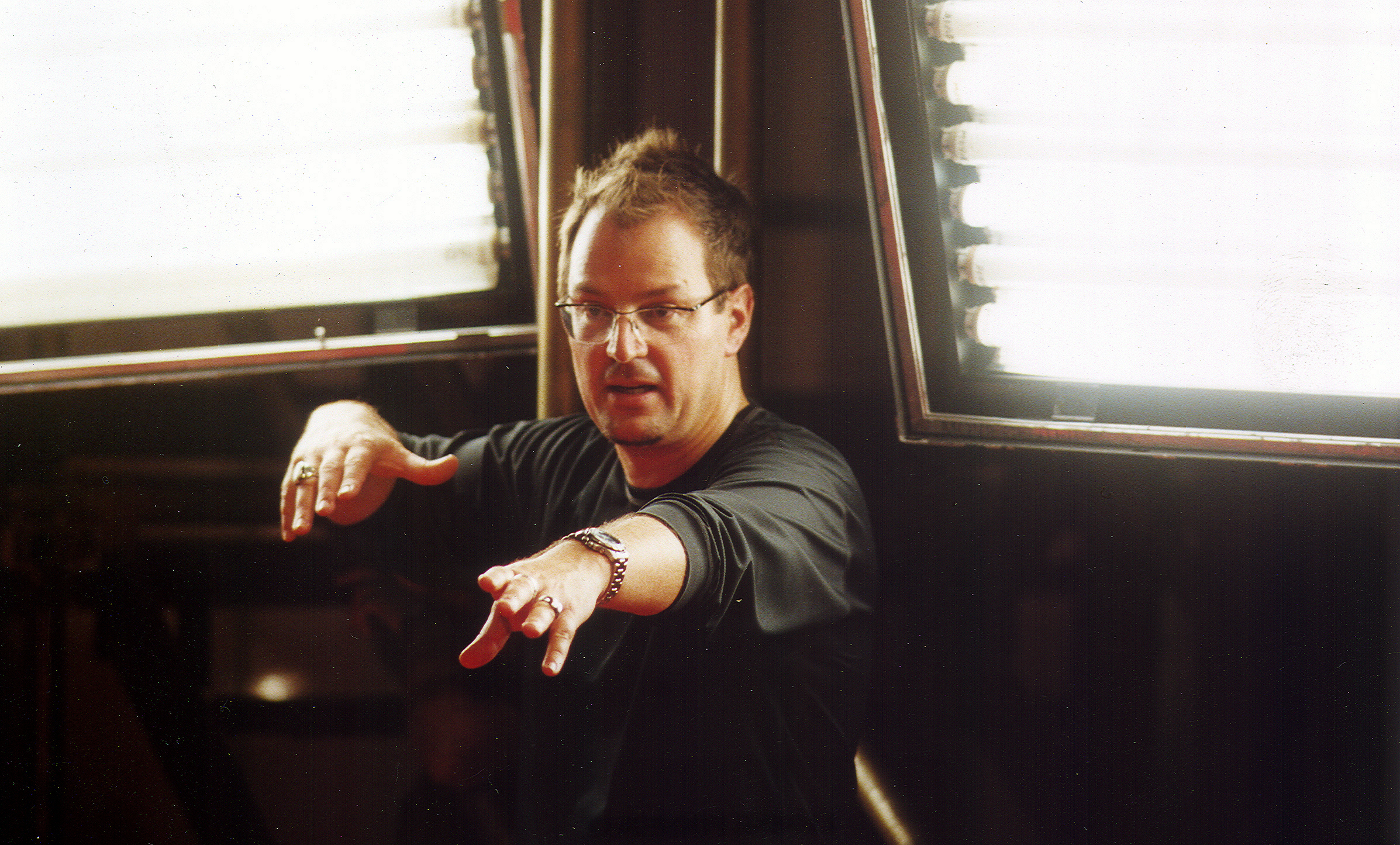 Foto por Lenise Pinheiro.